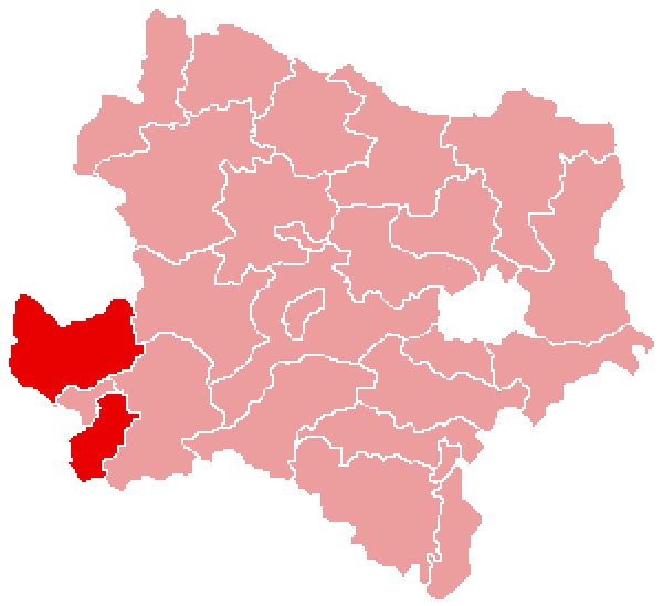 Karte: politischer Bezirk Amstetten Lizenz: GNU FDL Quelle: Zeichnung plp Datum: de:2004 Ort: Wien